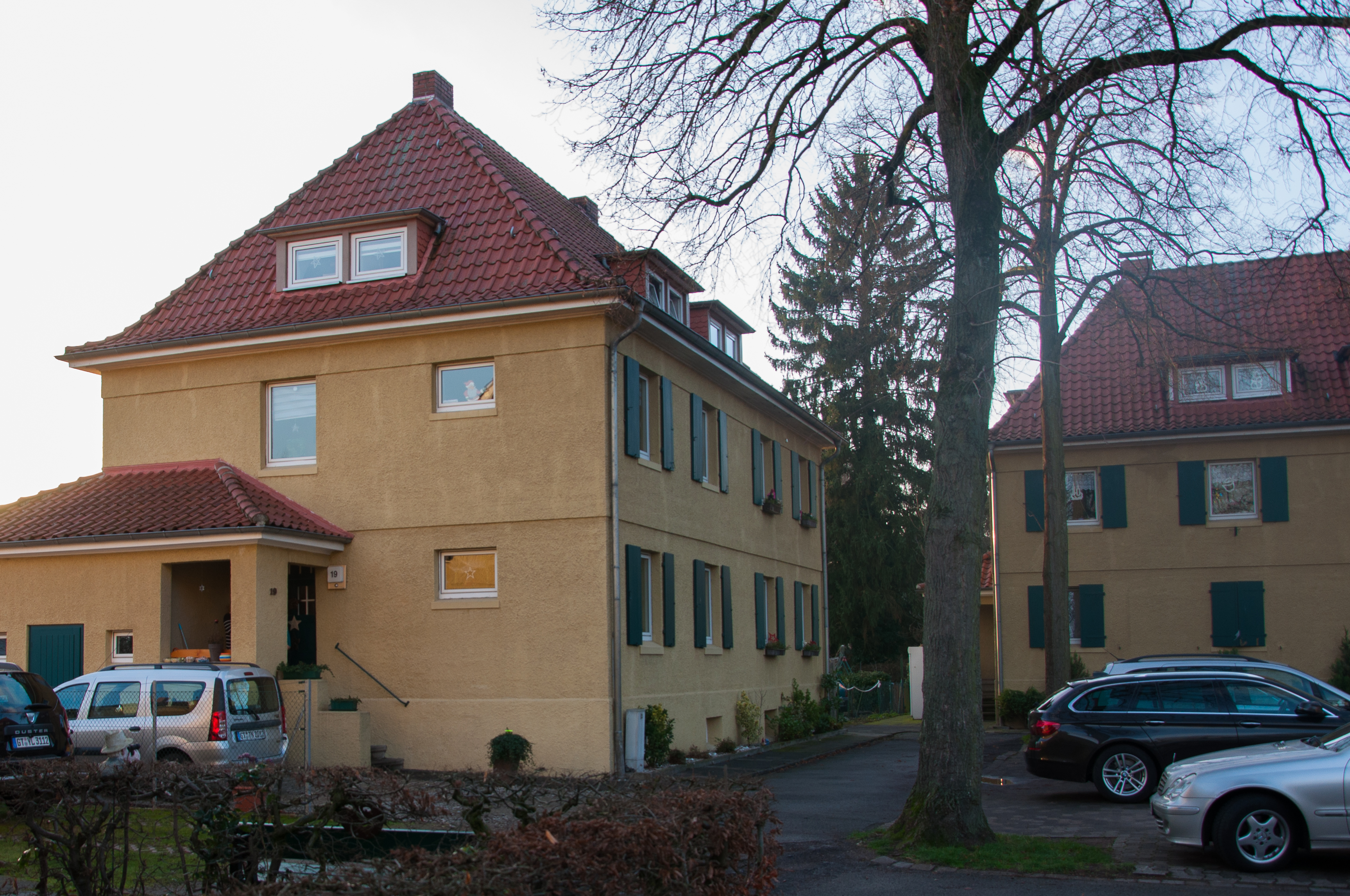 Haus Am Kamphof Gütersloh, Teil des Denkmalensembles "Am Kamphof"